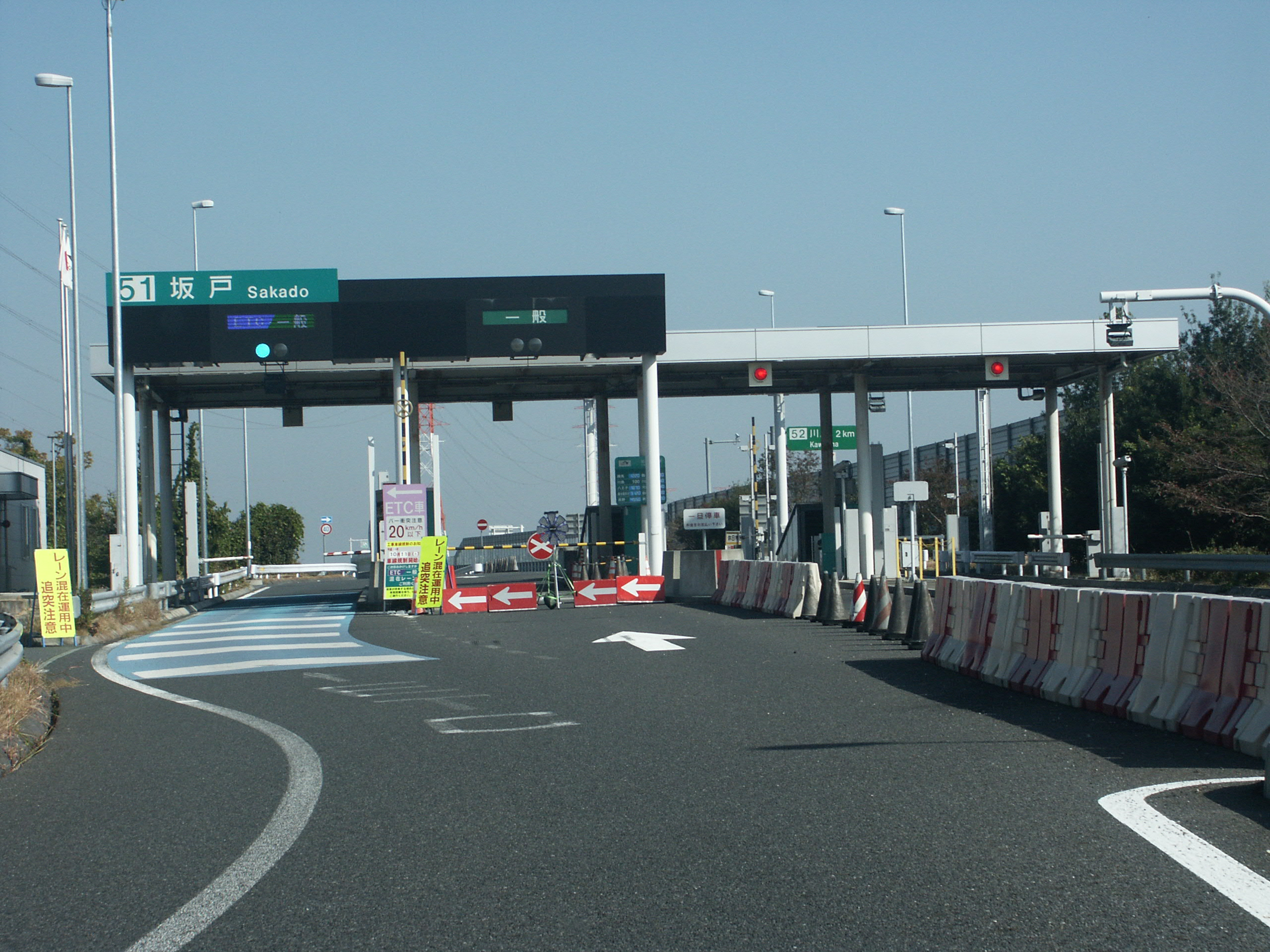 首都圏中央連絡自動車道圏央坂戸IC料金所